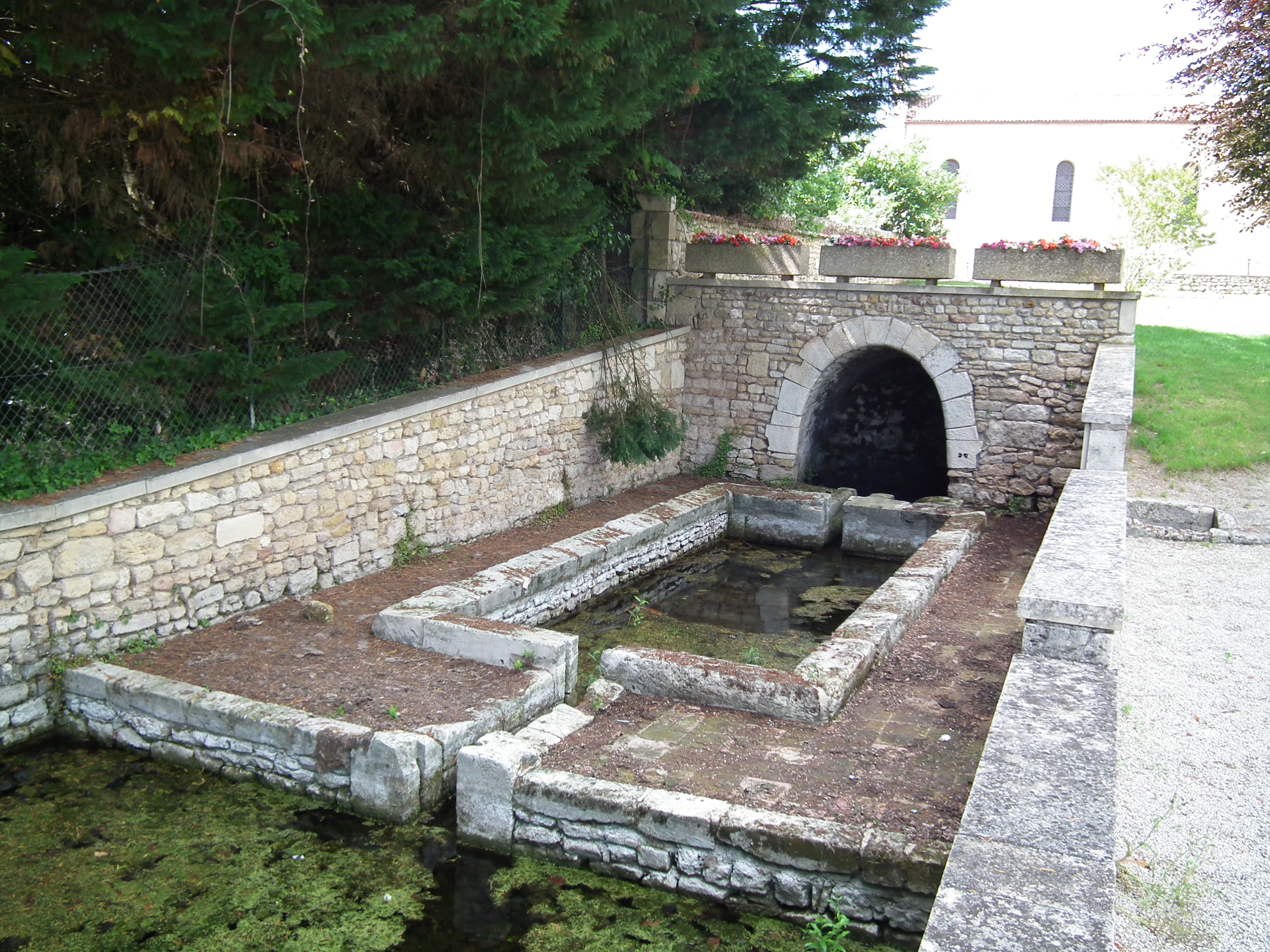 Le lavoir de Cravans